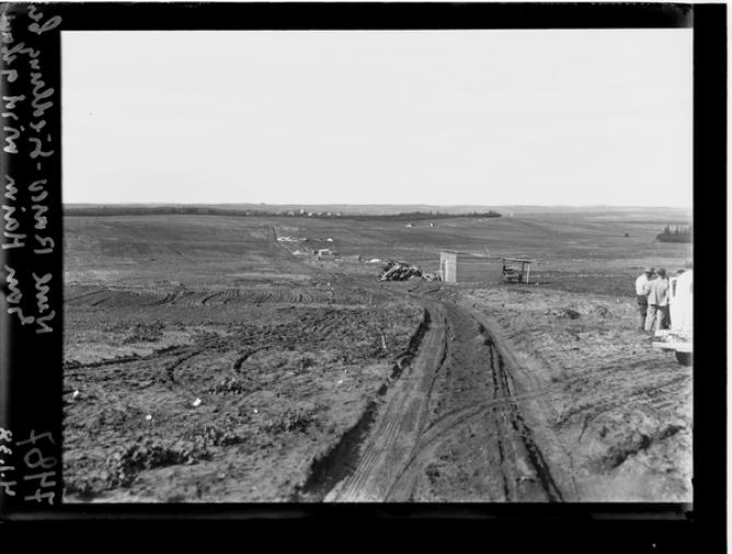 מושב שדה ורבורג בהקמה 1938 אוסף זולטן קלוגר גנזך המדינה